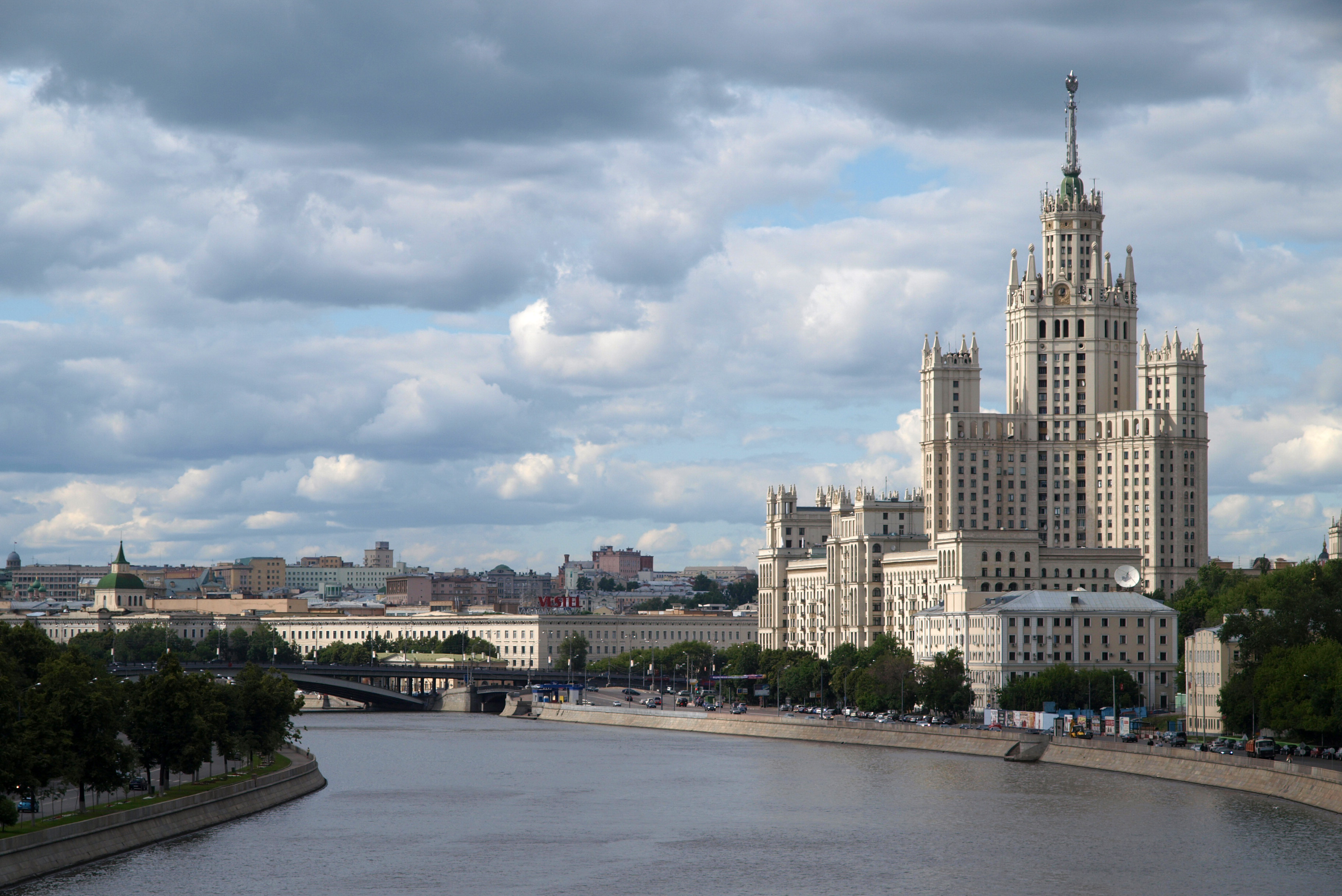 Дом на Котельнической с Большого Краснохолмского моста